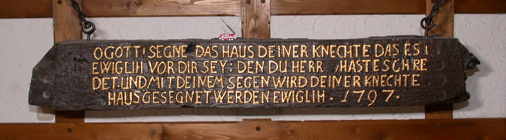 Balken des ehemaligen Schulhauses von Boitzum, heute im Feuerwehrgerätehaus